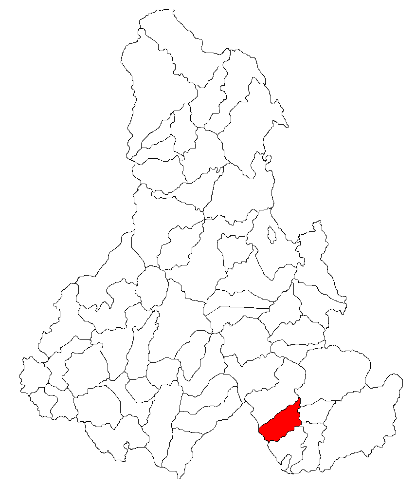 Categorie:Hărţi ale judeţului Harghita Contents 1 Licensing 2 Sursă 3 Licensing 4 Original upload log Licensing Sursă ro::Imagine:Harta_jud_Harghita.png